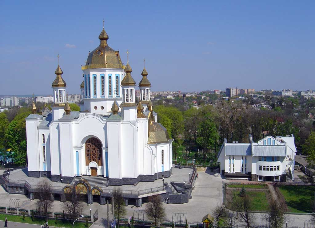 Покровский собор. самая высокая точка в городе Ровно